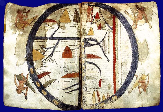 Mappamondo Beato di Liebana, del XII secolo conservato Torino, Biblioteca Nazionale Universitaria